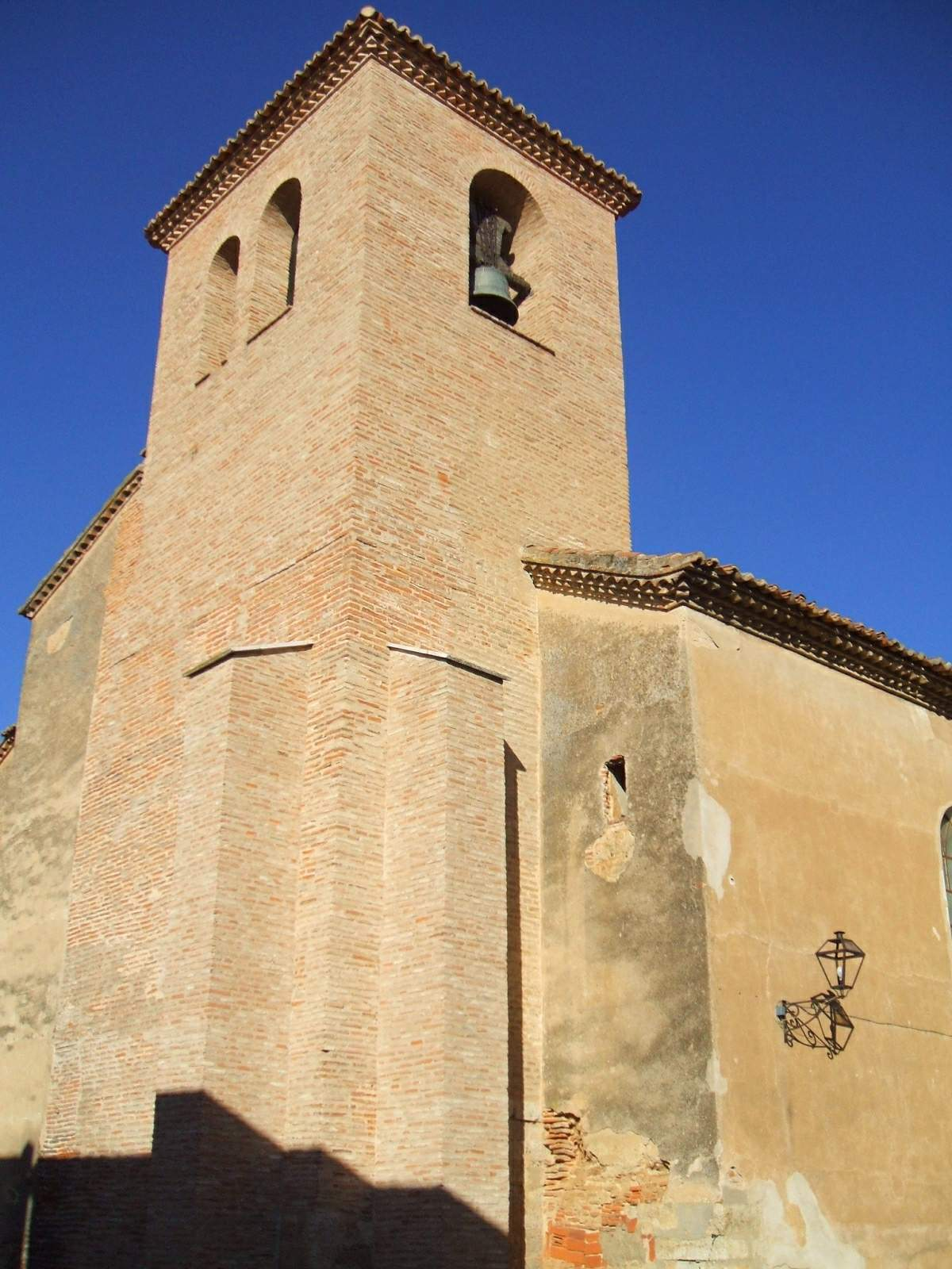 Toro (Zamora) - Iglesia de Santo Tomás Cantuariense